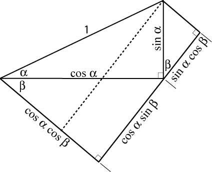 meetkundige figuur ter illustratie van de somregel voor sinus en cosinus eigen figuur, gemaakt door mijn zoon